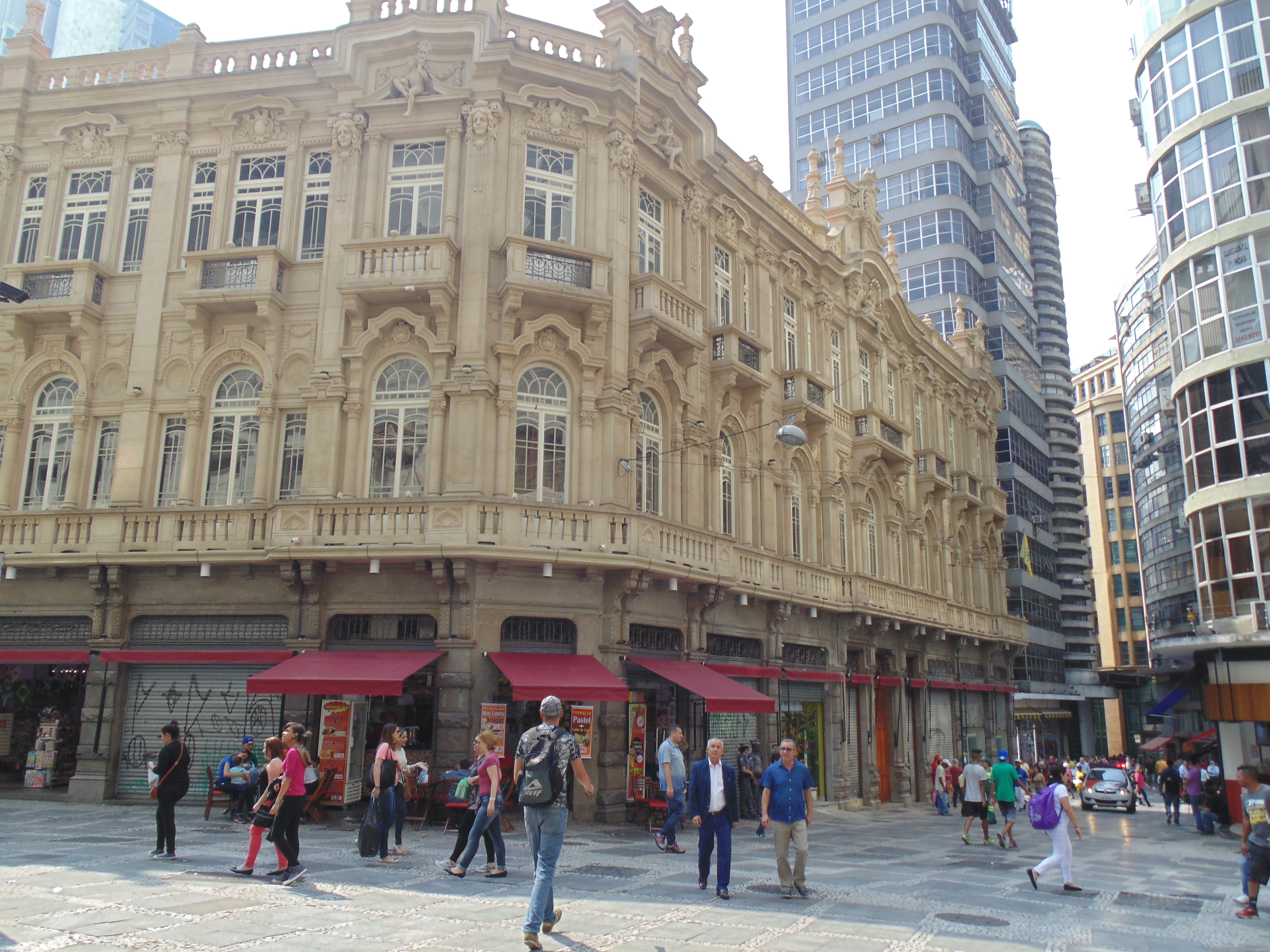 Fachada do Palacete Tereza Toledo Lara, em São Paulo (SP), Brasil